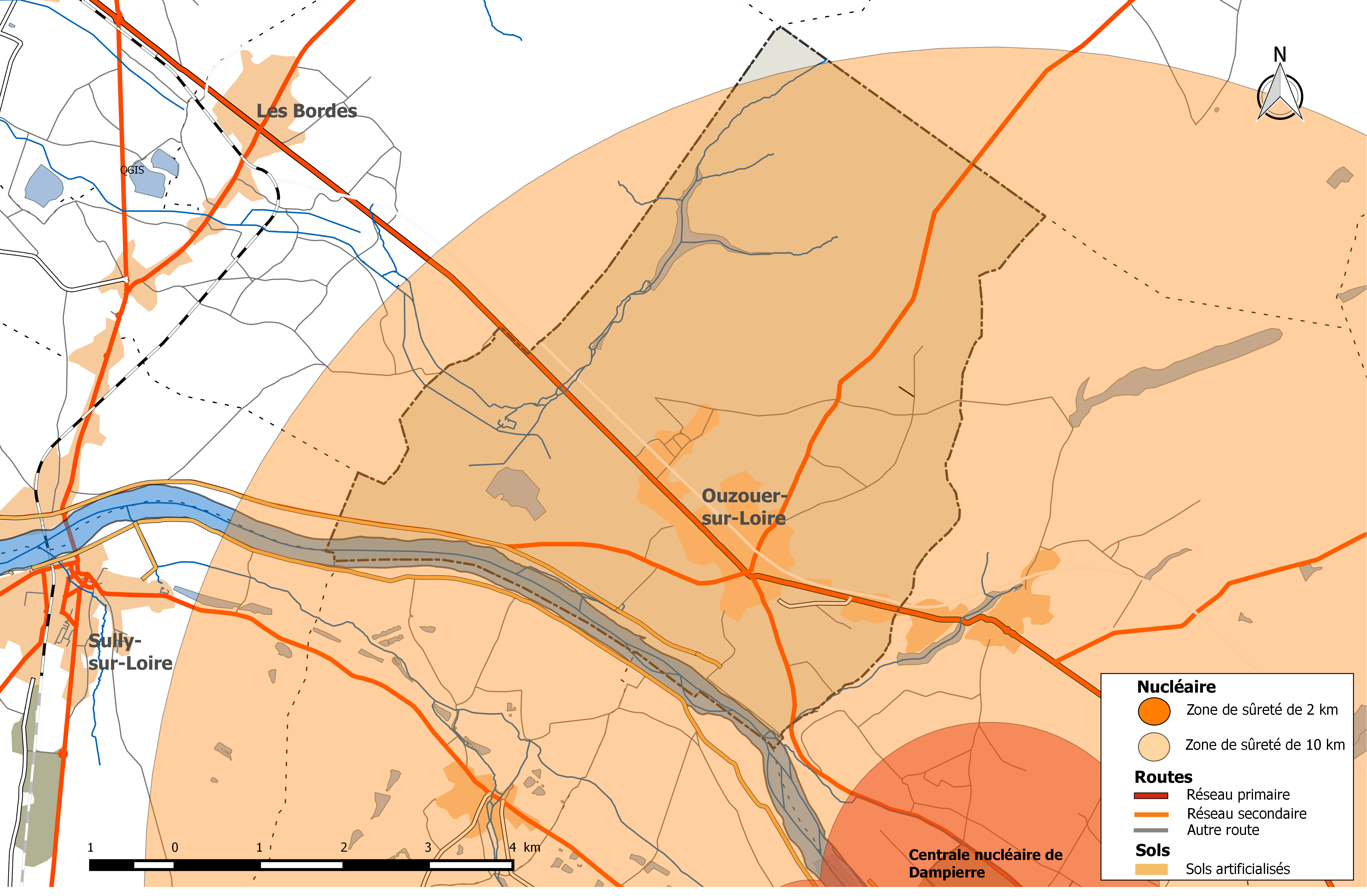 Zones de sûreté nucléaires 2 km et 10 km autour de la centrale de Dampierre - commune de Ouzouer-sur-Loire